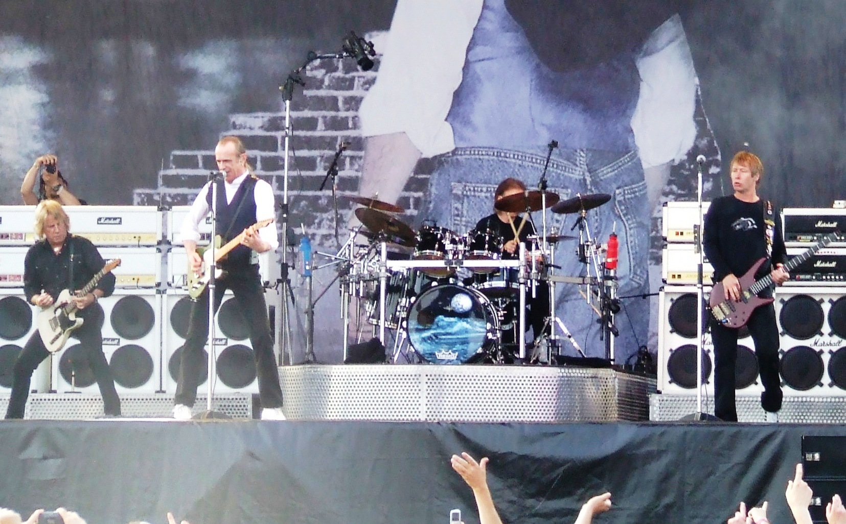 Dit is een zelfgemaakte opname, gefotografeerd op 9 juni 2006 op het Arrow Rock festival 2006 in Lichtenvoorde. De gebruikte camera is een Fuji s5600.